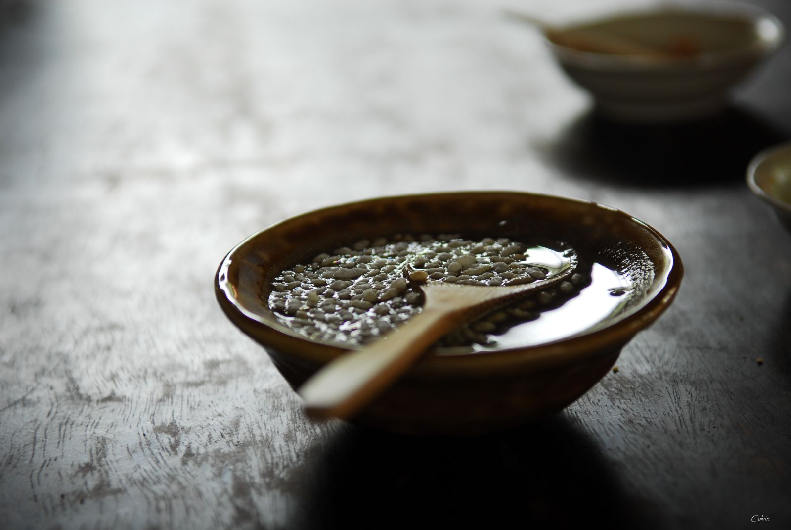 北埔 擂茶